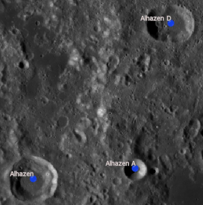 Cráter lunar Alhazen. Cráteres satélite. (Imagen LRO)